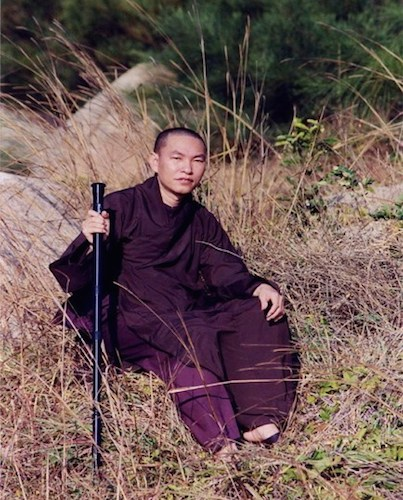 Kim Cang Thựơng Sư Thích Viên Thành